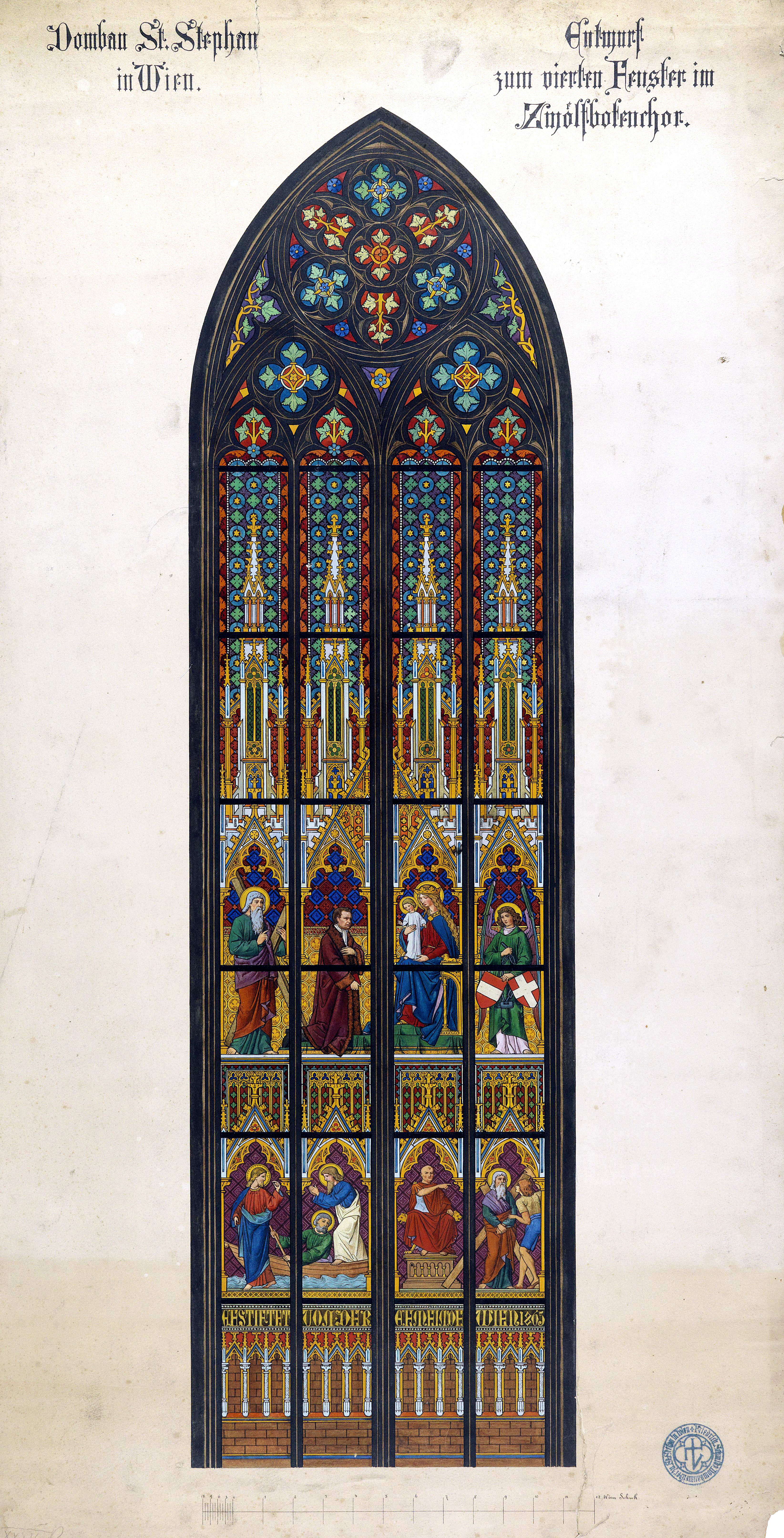 Entwurf zum vierten Fenster im Apostelchor des Doms St. Stephan, Wien (1864); Gouache und schwarze Feder über Bleistift auf Karton, 100 x 52,5 cm (hl. Andreas, Madonna mit Kind, Engel mit Wappen von Österreich und Wien); Fenster 1945 zerstört